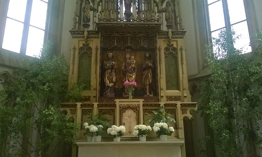 Oltář